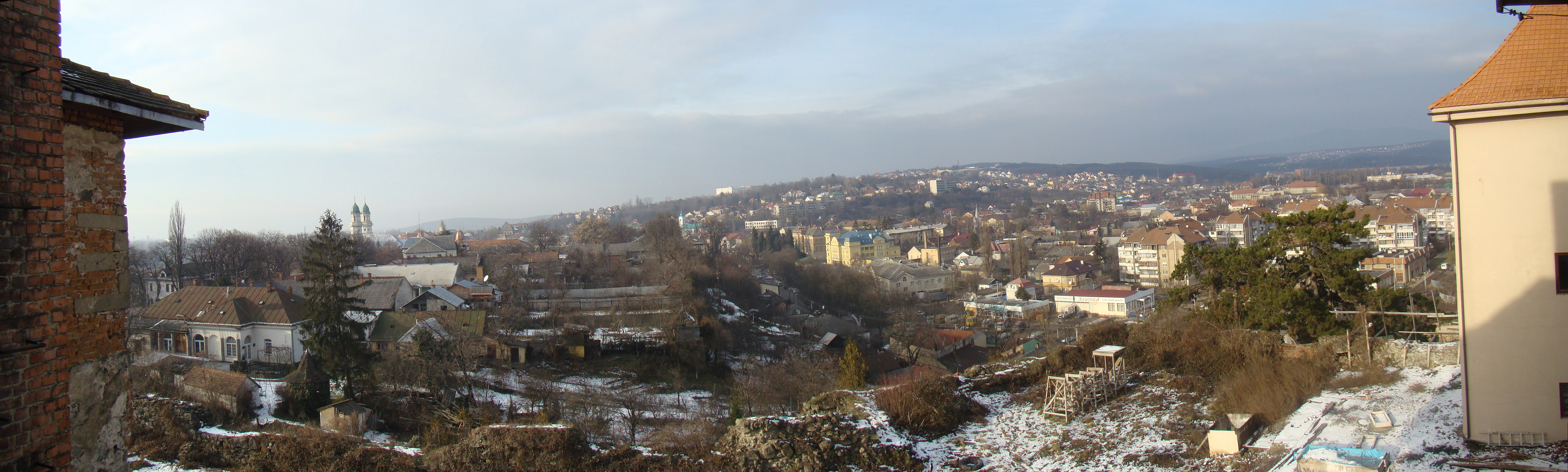 Замок-фортеця (мур.), Ужгород, вул. Капітульна, 33